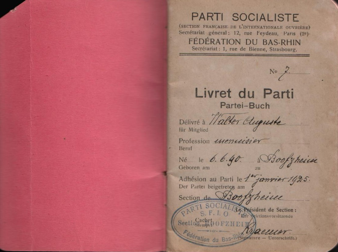 Parteibuch der "Parti Socialiste". Das Buch stammt aus dem Jahre 1925. Es ist zweisprachig (französisch / deutsch). (Privatbesitz: N.Luffy, 52223 Stolberg)